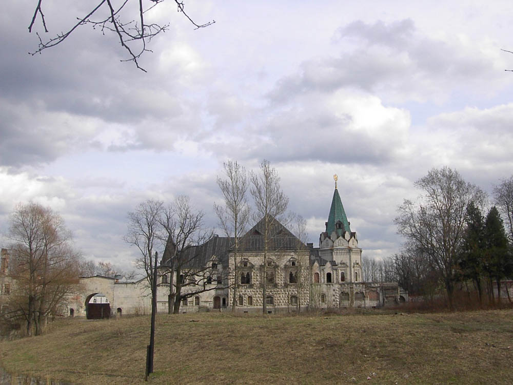 Fyodorovsky Townlet in Tsarskoe Selo